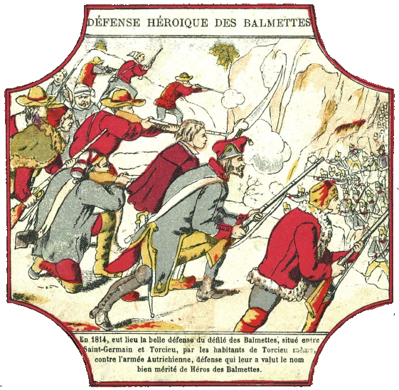 Illustration d'époque de la bataille des Balmettes, à Torcieu (Ain, France)